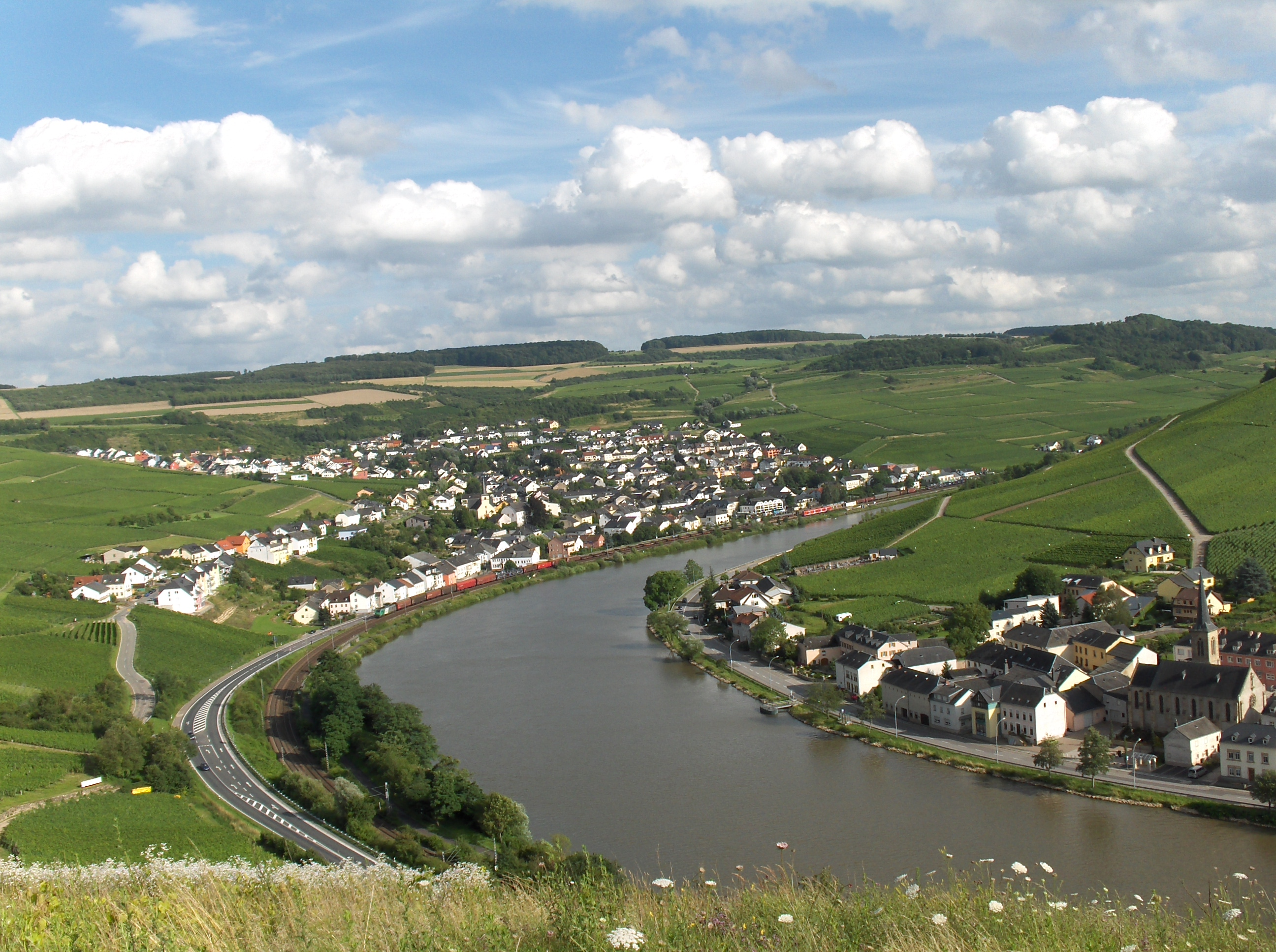 Nittel und Machtum an der Mosel